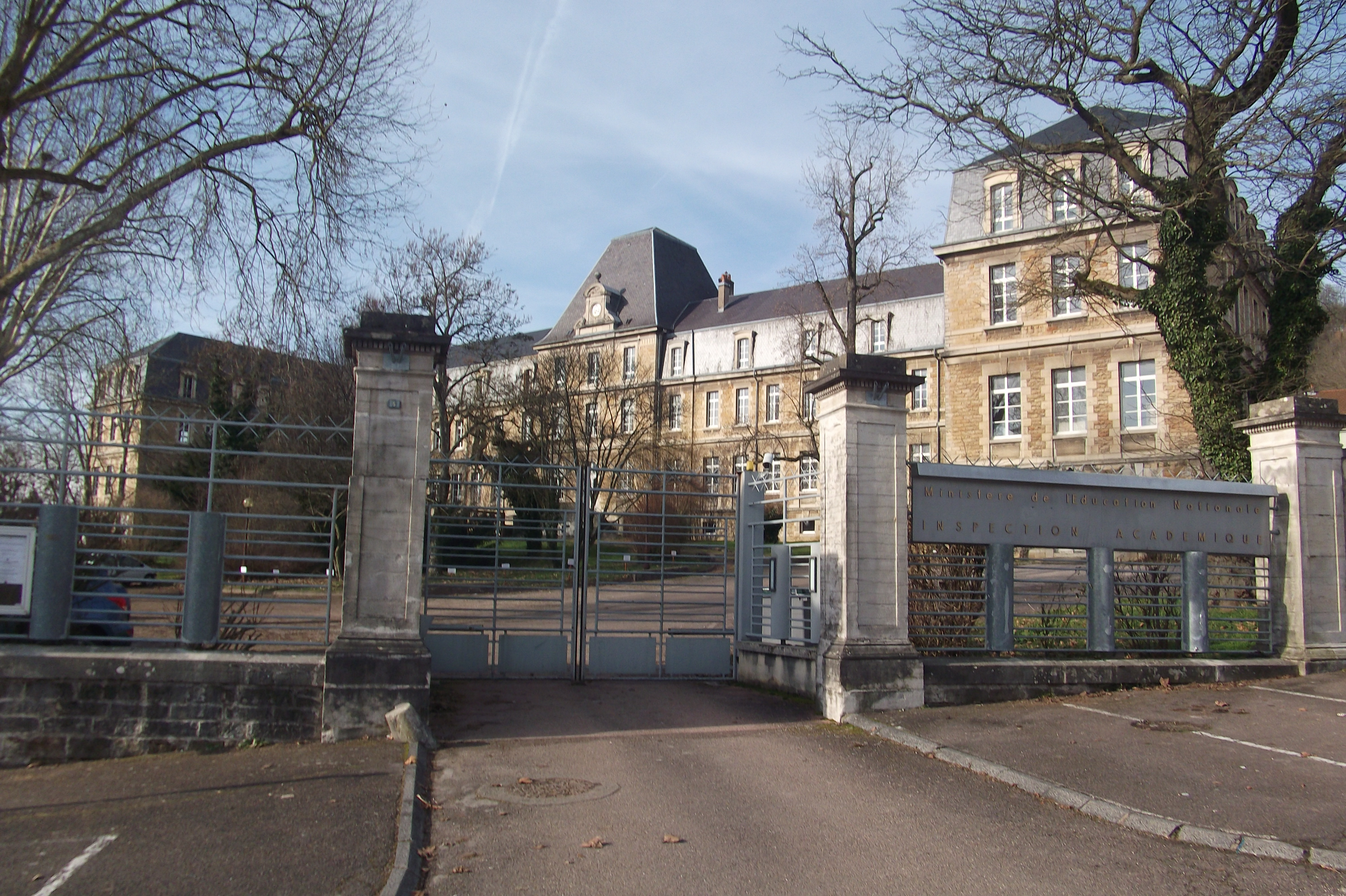 L'Inspection Académique de Vesoul